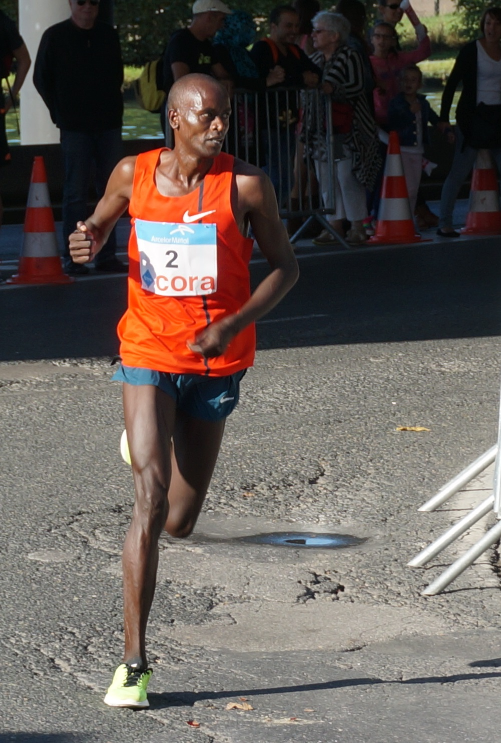 lors du Marathon de Reims 2014.